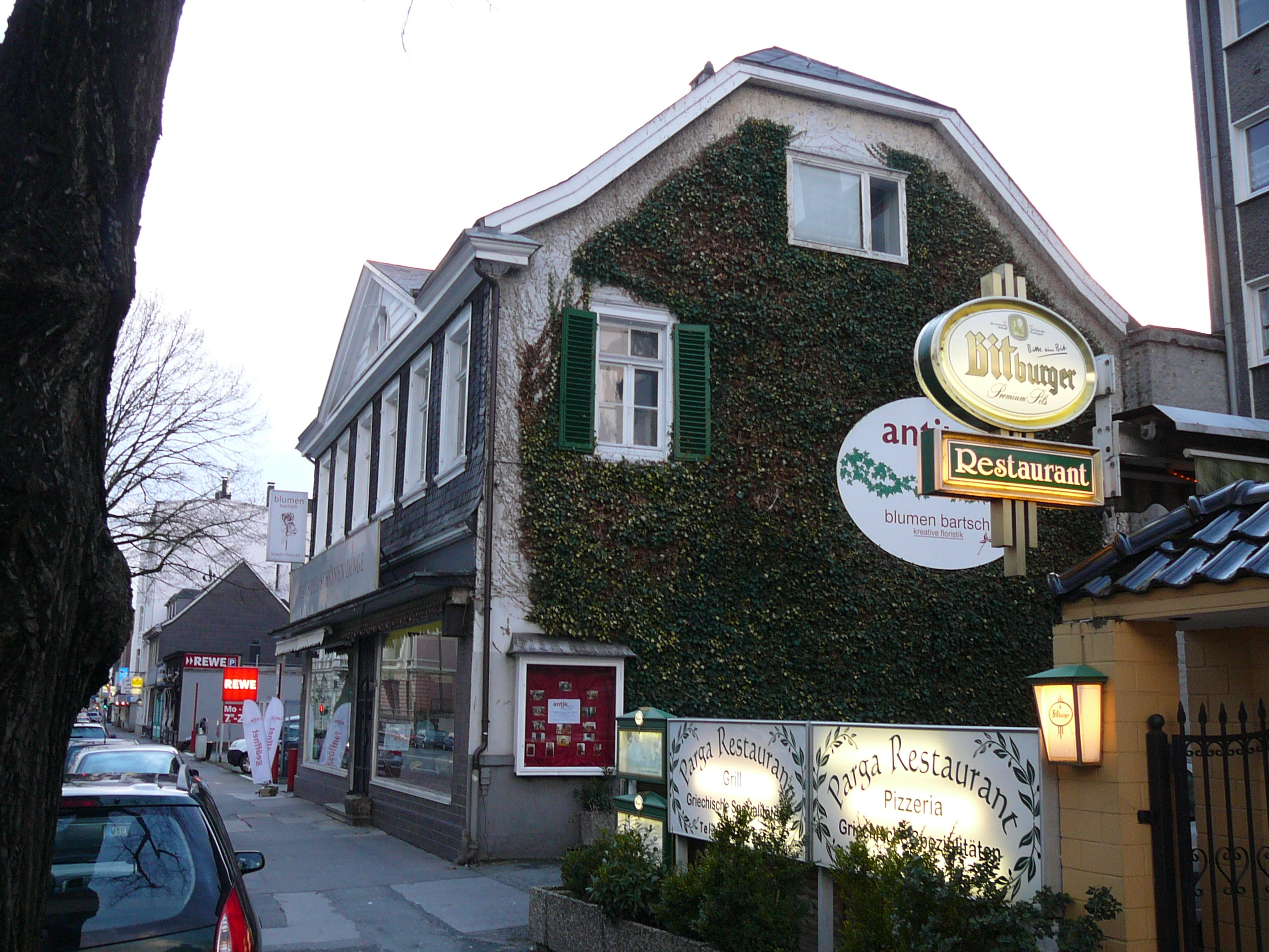 Friedrich-Engels-Allee, Wuppertal